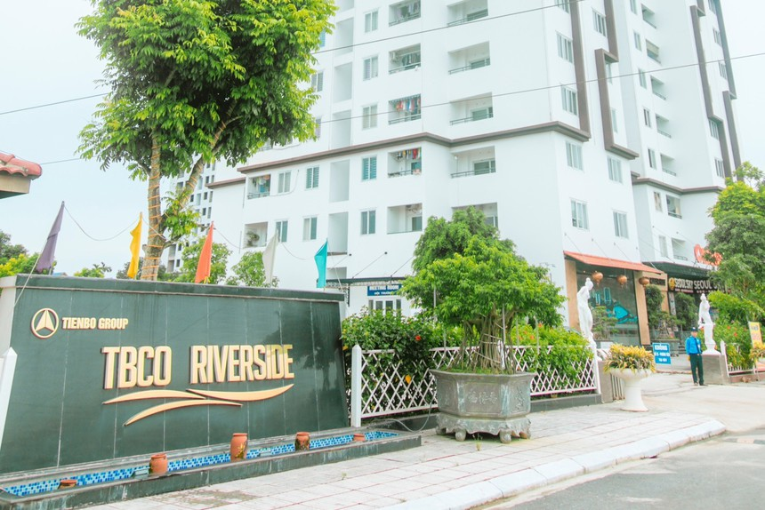 Công ty Cổ phần Tập đoàn Tiến Bộ (Trụ sở tại số 01, đường Bắc Kạn, phường Hoàng Văn Thụ, thành phố Thái Nguyên) là Công ty kinh doanh đa ngành nghề, ở nhiều lĩnh vực mũi nhọn như: Bất động sản, sắt thép, vật liệu xây dựng, sản xuất quả cầu lông tiêu chuẩn thi đấu, giàn giáo, cốp pha.